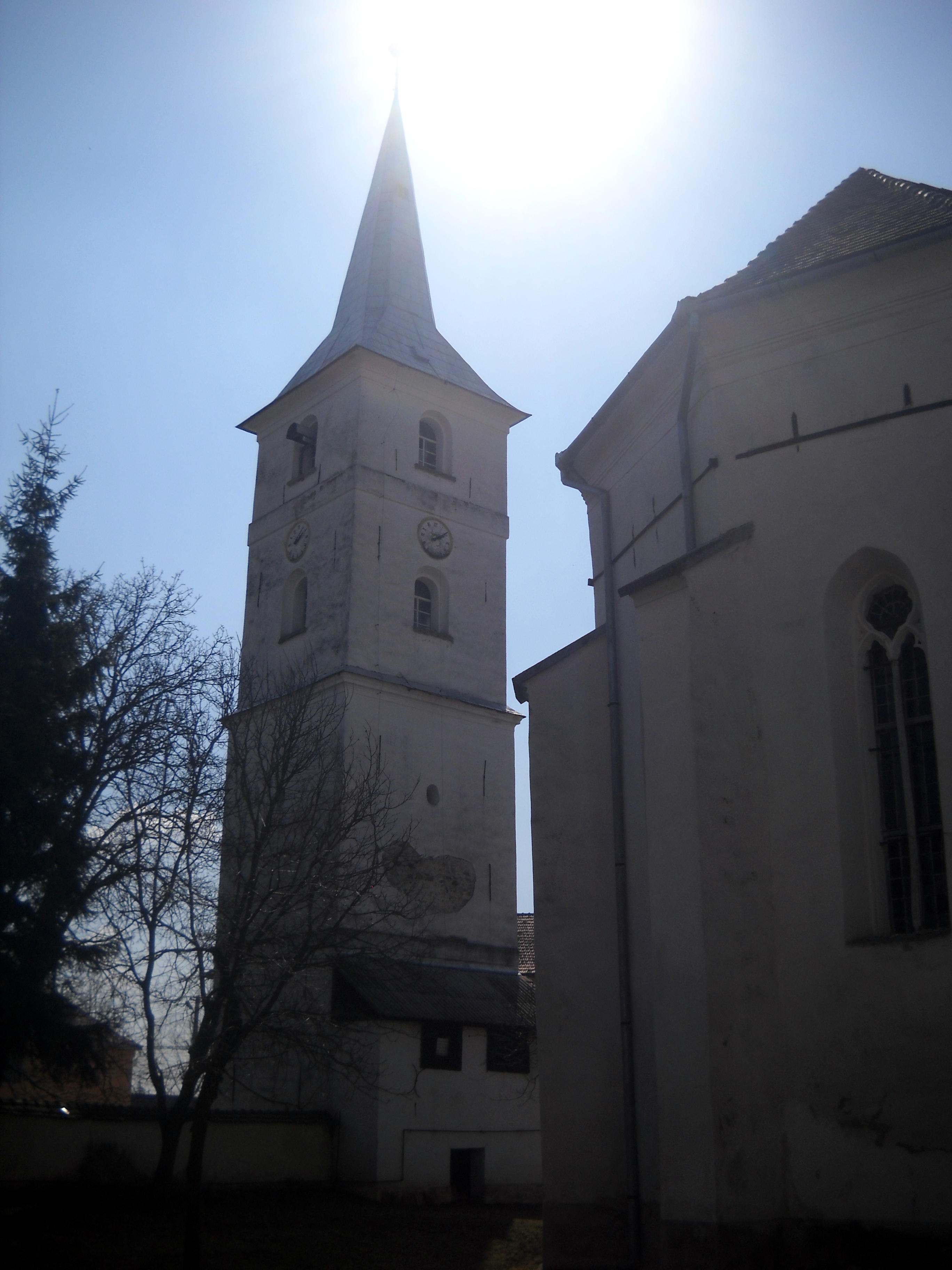 Biserica evanghelică din Batoș, județul Mureș